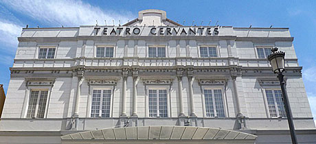 Foto del Teatro Cervantes de Málaga